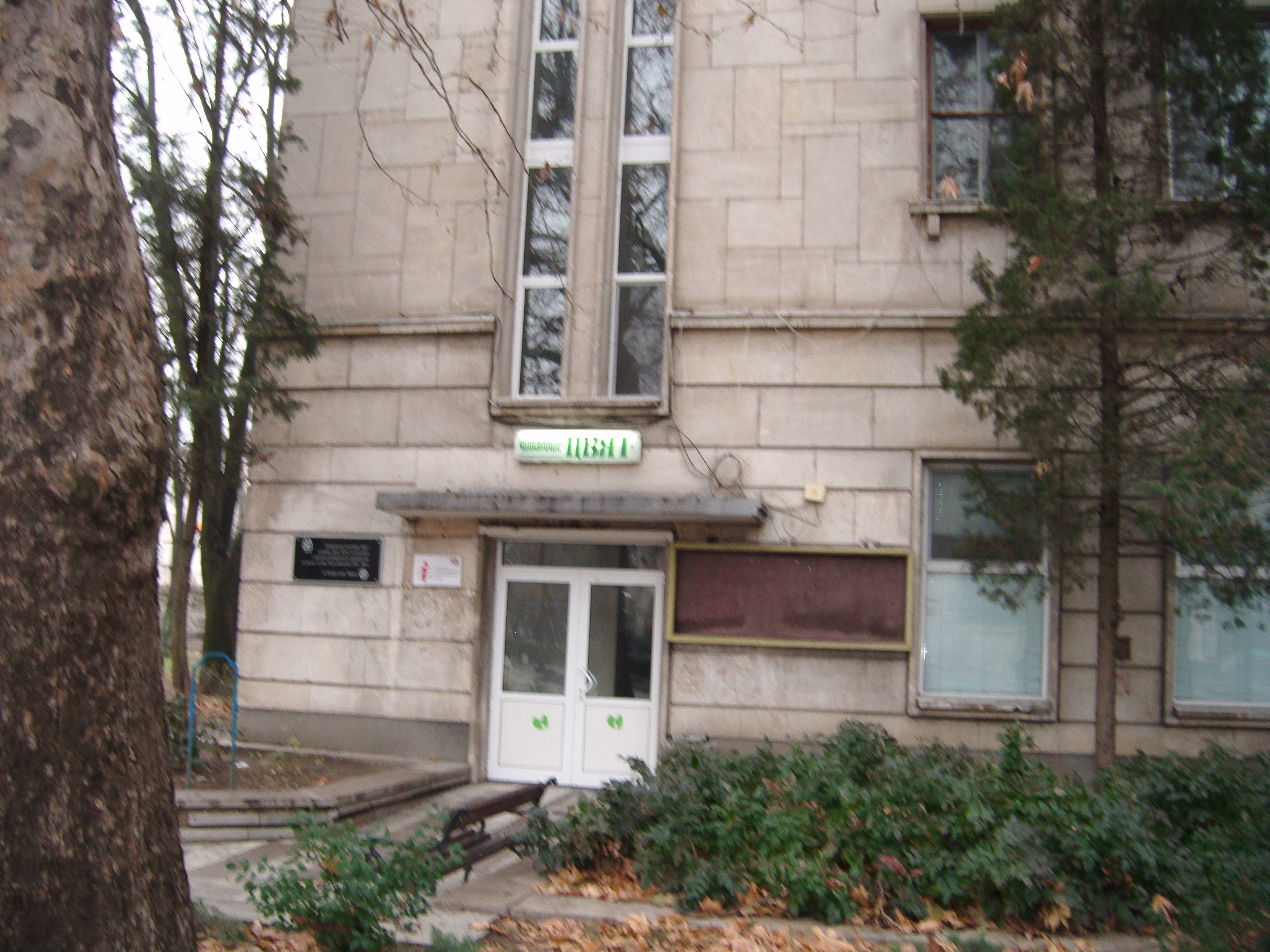 кино "Цвят"